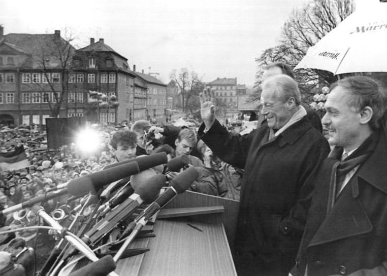 ADN-ZB-Hirndorf-Tele-3.3.90-frs-Erfurt: SPD-Wahlkundgebung mit Willy Brandt-Der Ehrenvorsitzende der SPD der BDR und der DDR, Willy Brandt (2.v.r.), sprach während einer Wahlkundgebung der SPD auf dem Domplatz der Bezirksstadt. Rechts der Vorsitzende der SPD der DDR, Ibrahim Böhme.